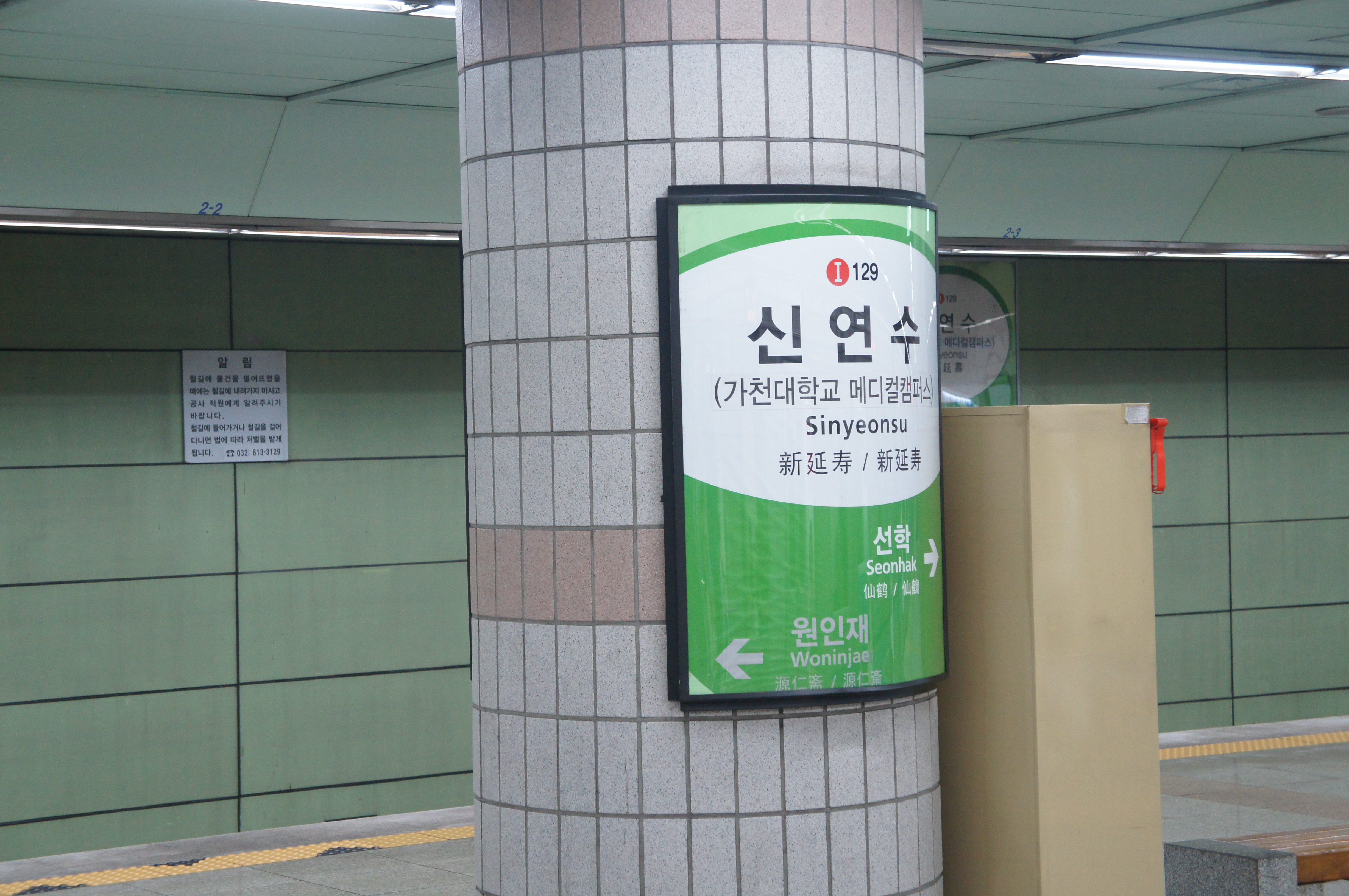 신연수역 역명판